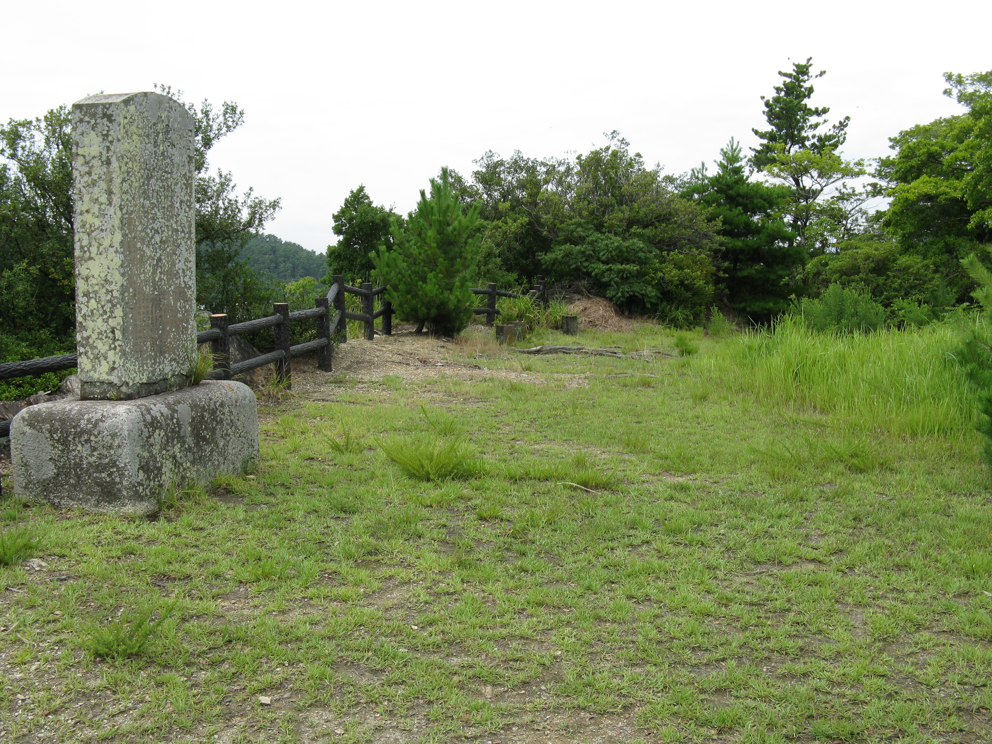 奠供山 山頂